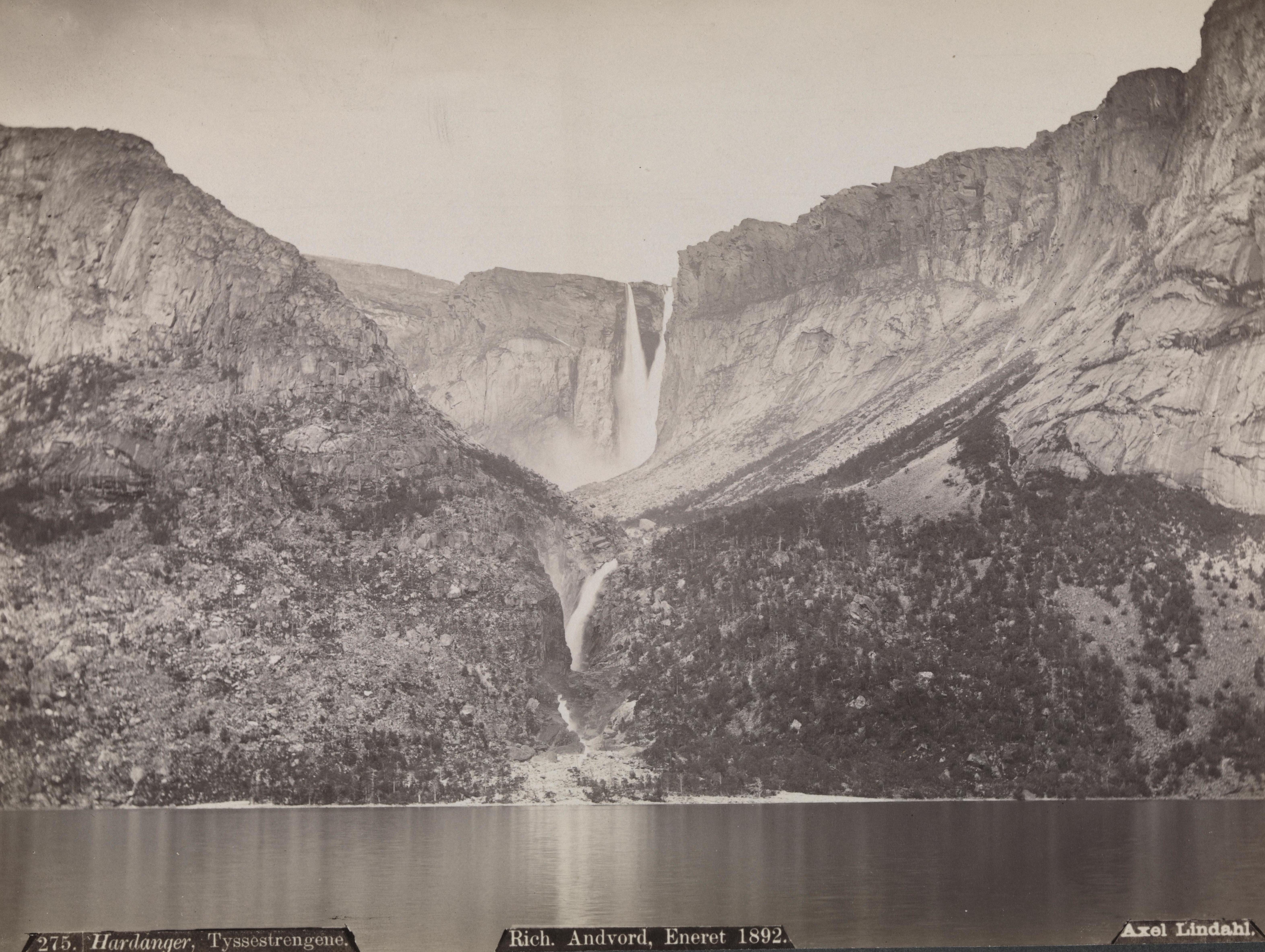 Sted: Tysso Kommune: Odda Fylke: Hordaland Tagger: Fotografert fra Ringedalsvatnet. fosser landskapsfotografi